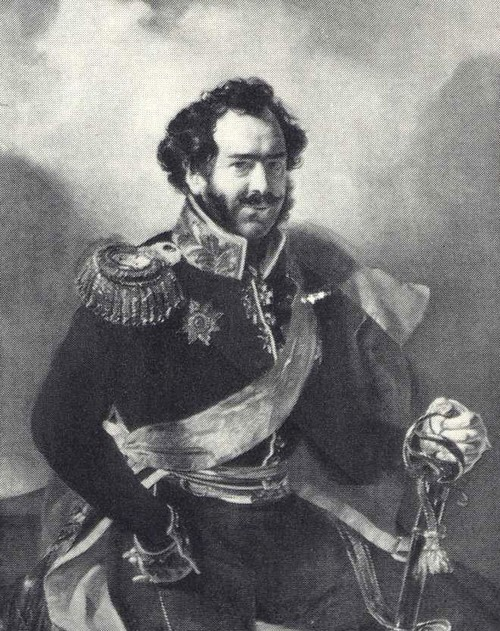 Prince Paul Lopukhin (1790-1873)